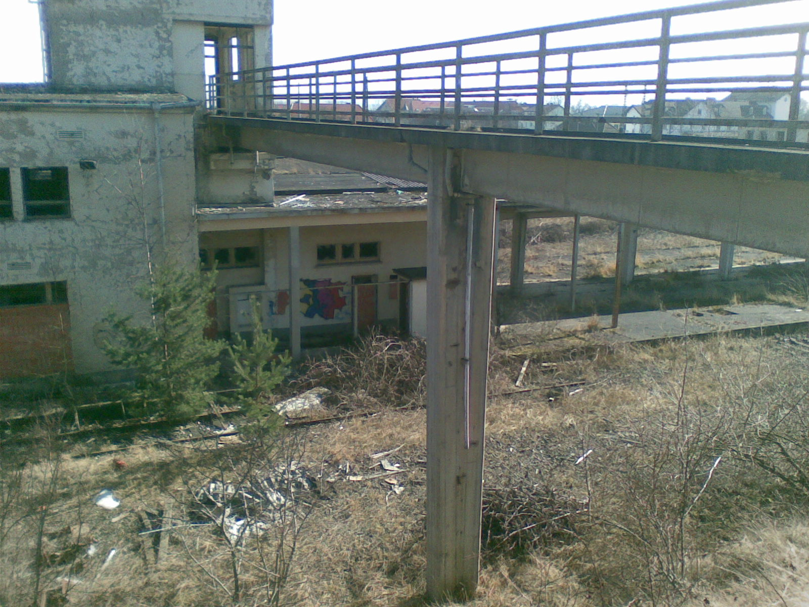 Bahnhof Gerstungen, ehemalige GÜST im März 2012 kurz vor dem Abriss